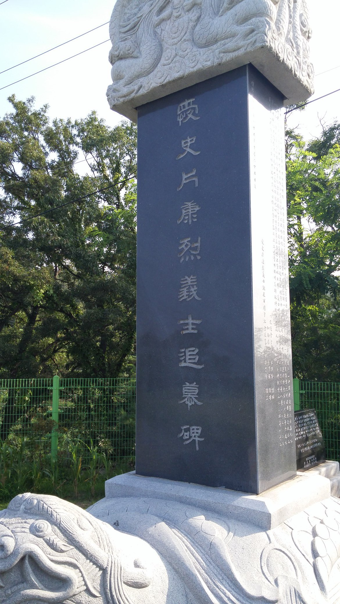 한국어 (조선): 평화전망대 편강렬의사 추모비